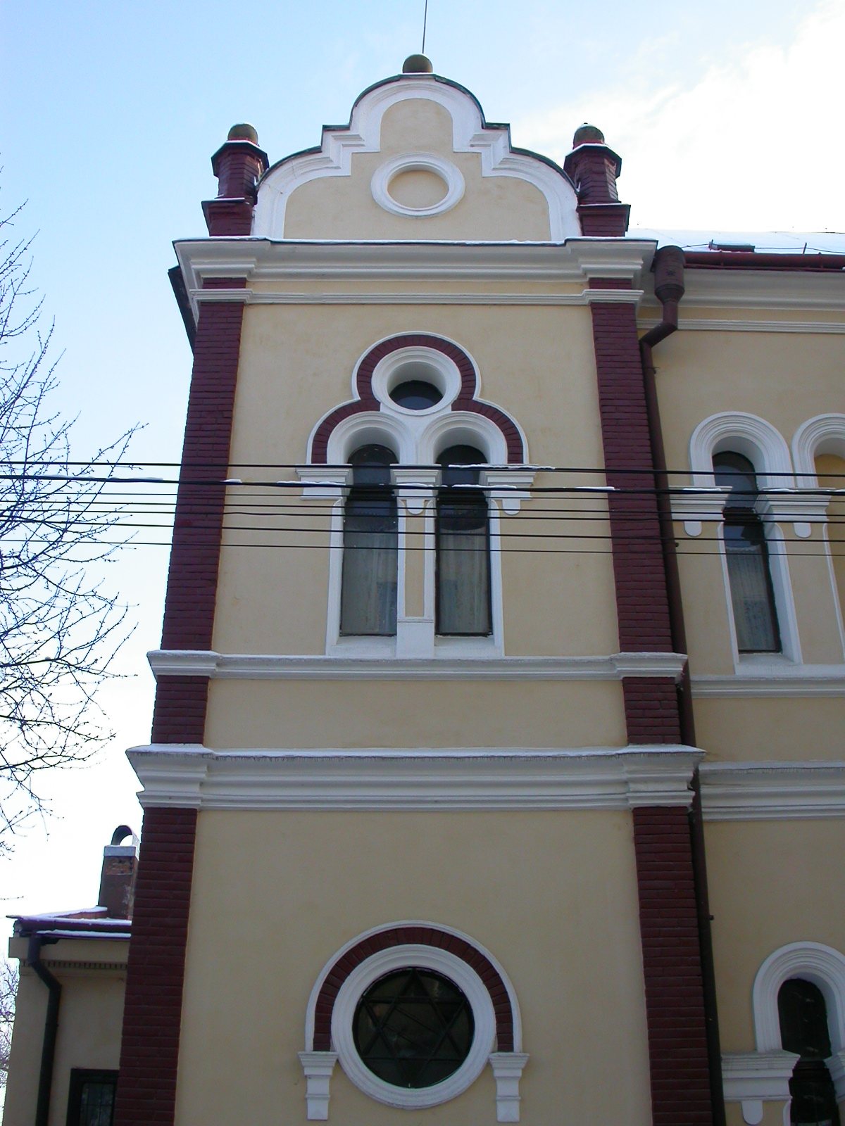 Sinagogă, 1902